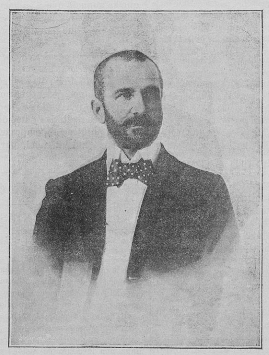 Excmo Sr. D. Pascual Amat y Esteve. Subsecretario de Justicia